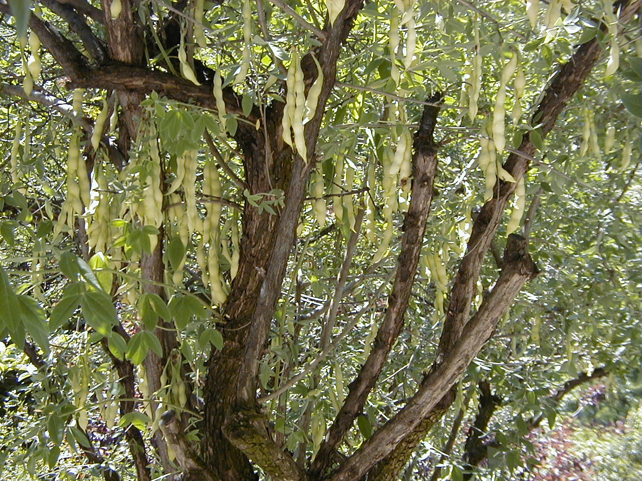 Anagyris foetida, frutos. Real Jardín Botánico, Madrid.